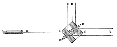 Heliotrop.